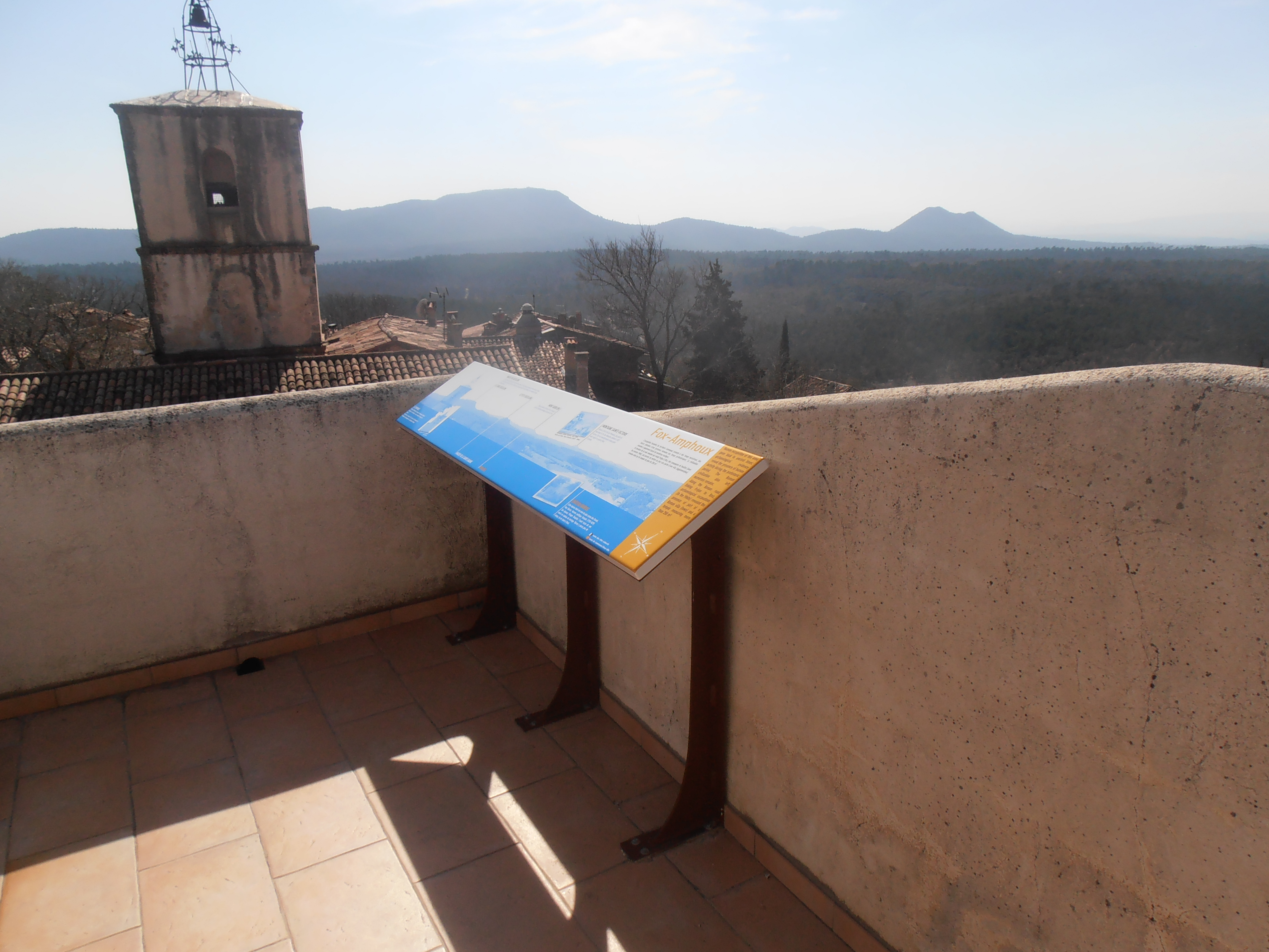 Var, Fox-Amphoux, Le paysage depuis le belvédère au dessus de l'ancienne prison